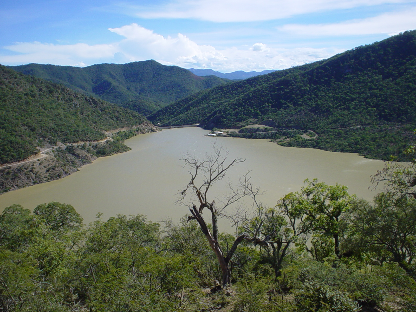 Represa Comarapa